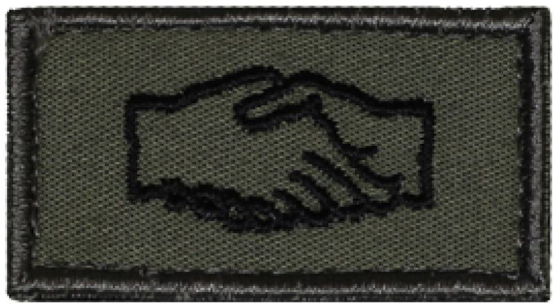 Betreuuer